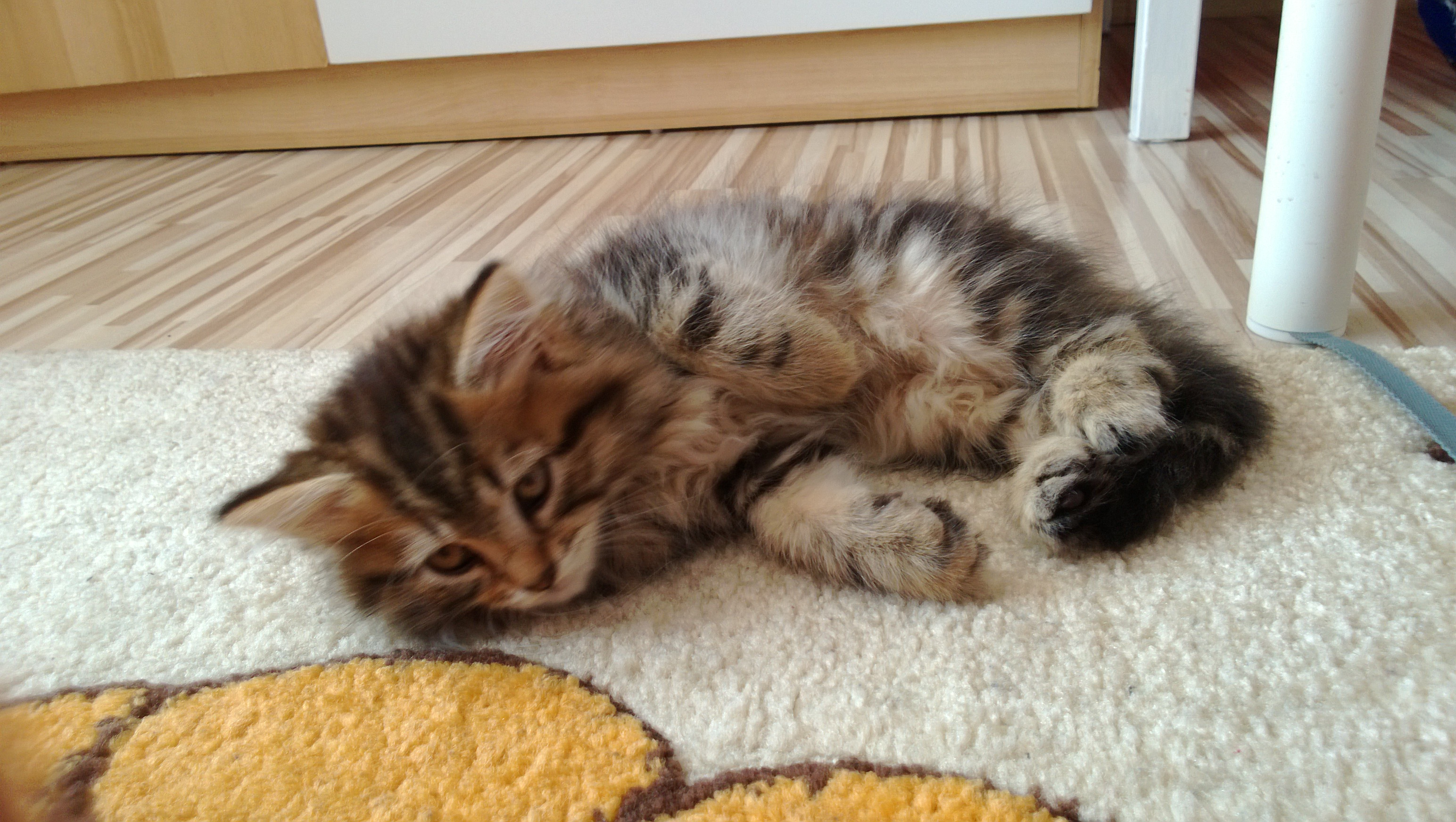 Kotka - 7 tygodni